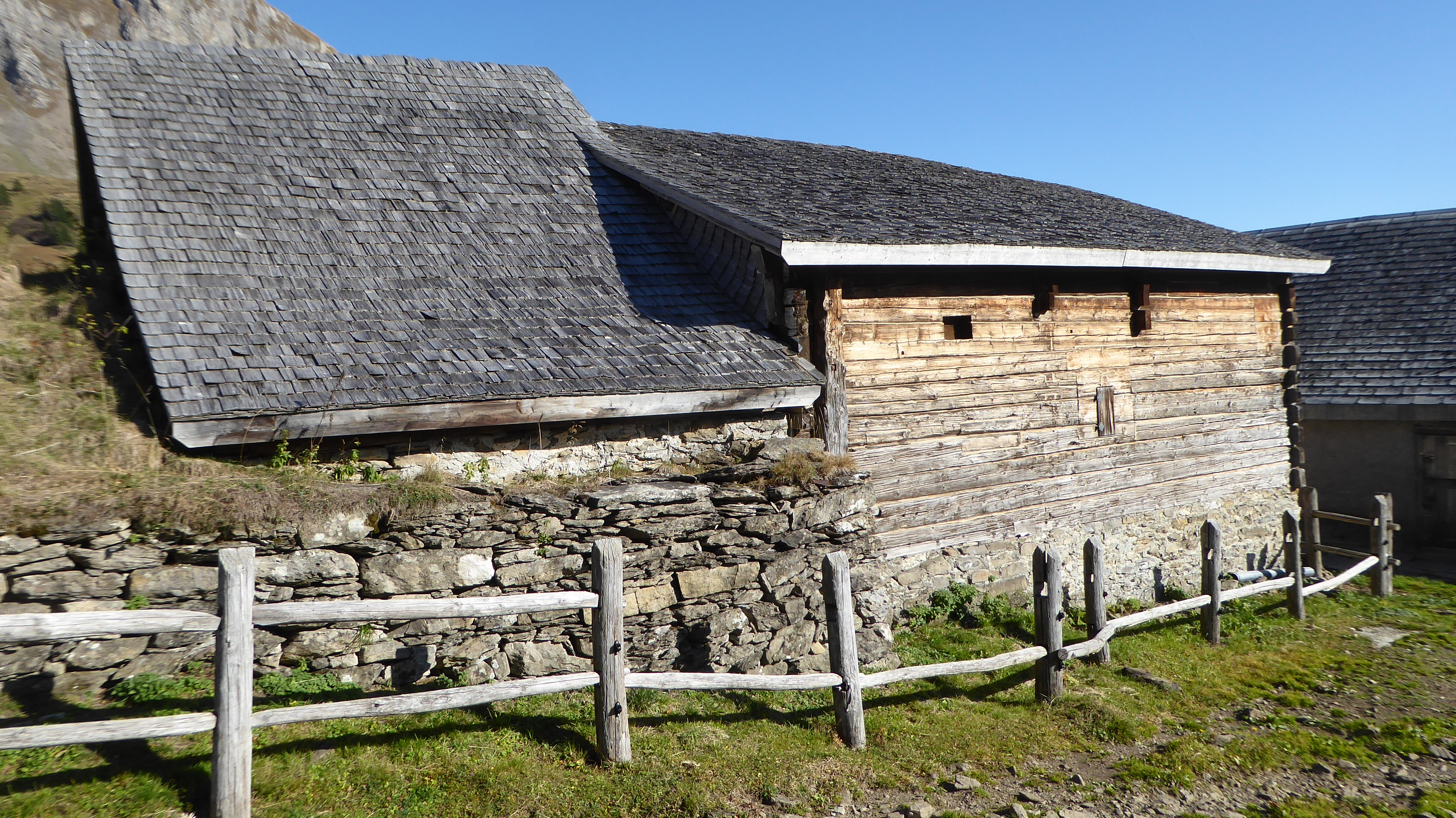 Rathaus Palfries von West